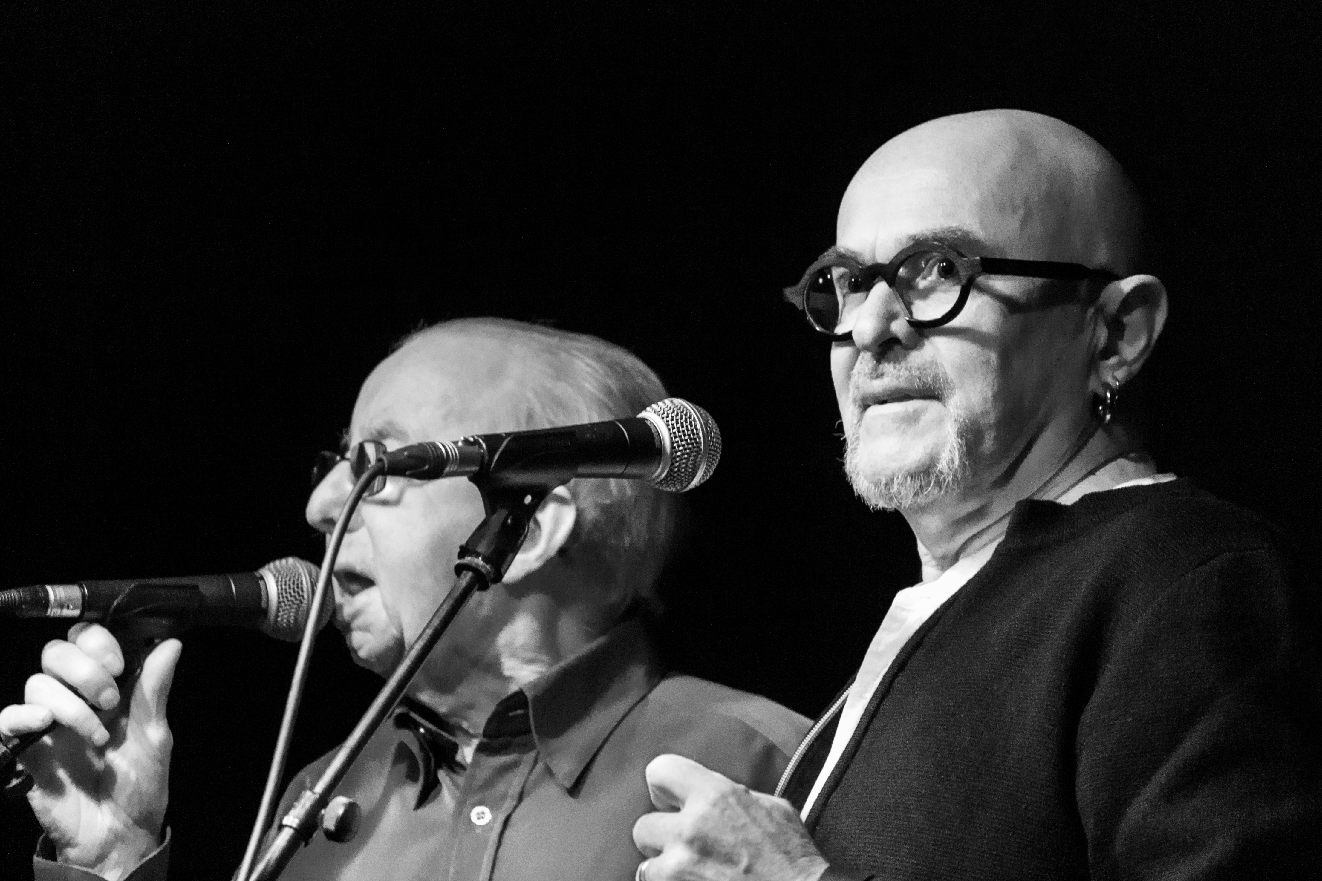 Fest-deiz et fest-noz du 5ème « Entre-deux Fest » organisé le 30 décembre 2016 à Poullaouen par Dañs-tro pour fêter les 26 ans de scène d'Annie Ebrel et Nolùen Le Buhé, célèbre duo de kan ha diskan.